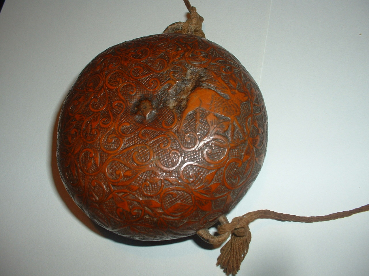 photo gourde Théodore (face arrière), Corsica